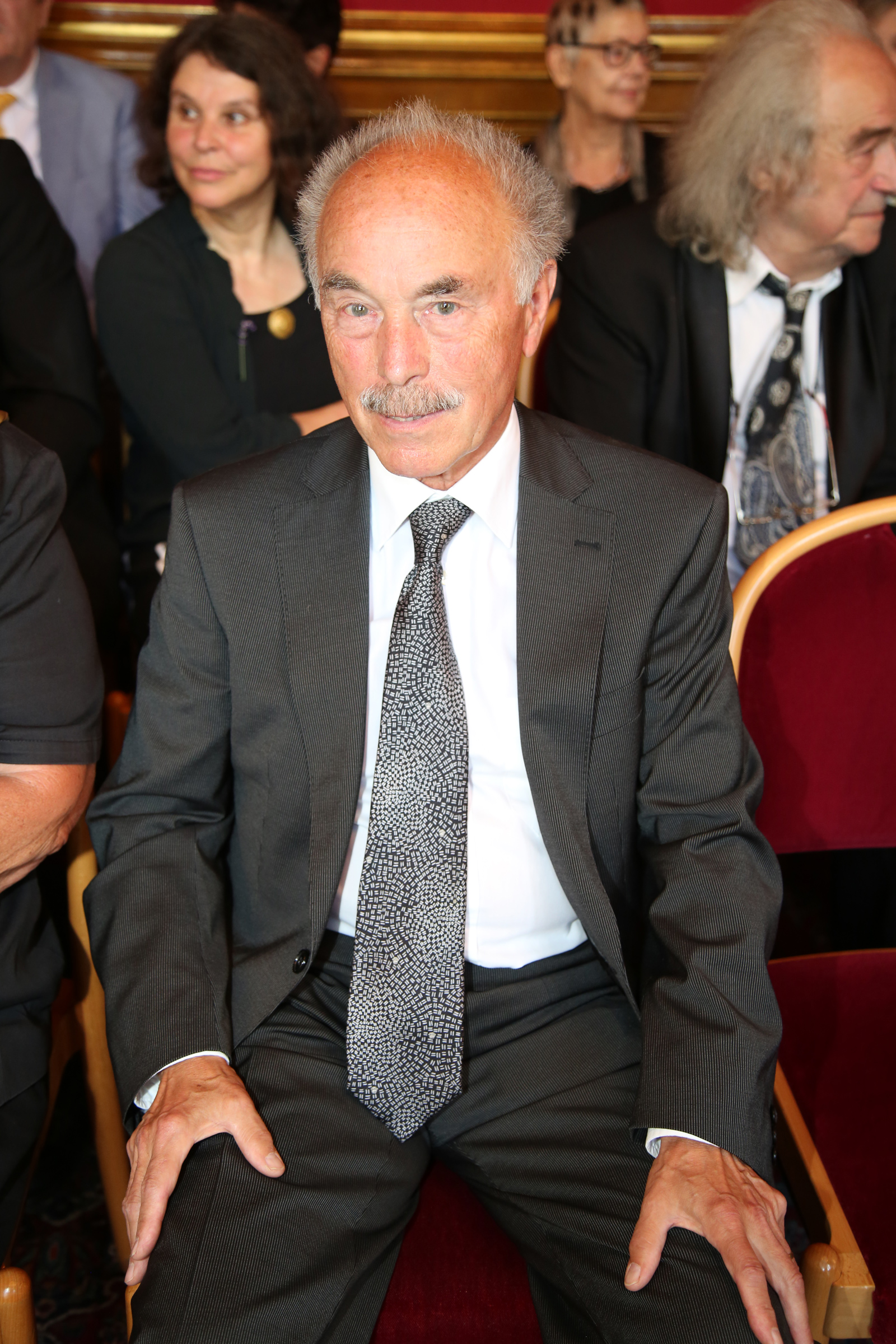 Rieder_Sepp-5706